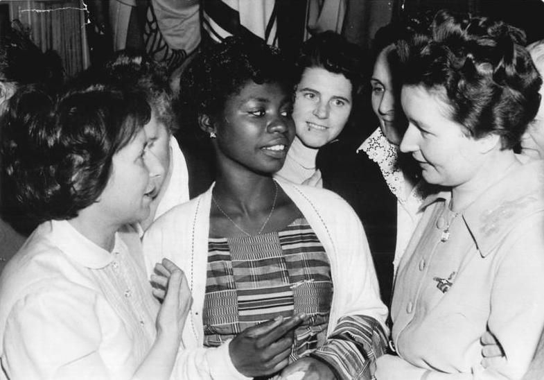 Zentralbild- We-Fr 23.11.1960 VII. Bundeskongress des DFD. 1. Tag - In der festlich geschmückten Berliner Dynamo-Sporthalle wurde am 23.11.1960 der VII. Bundeskongress des Demokratischen Frauenbundes Deutschlands eröffnet. An dieser Tagung der größten Frauenorganisation in der Geschichte Deutschlands nehmen weit über 1 400 Delegierte und Gäste teil. Die Bedeutung des Kongresses wird durch die Anwesenheit von Vertreterinnen der Internationalen Frauenbewegung aus 17 Ländern der Erde unterstrichen. Der dreitägige Kongress wird sich mit dem Beitrag der Frauen und Mütter im Kampf zur Sicherung des Friedens und zum Aufbau des Sozialismus in der DDR beschäftigen. UBz. Veronika Prempel aus Ghana (Mitte) unterhält sich in einer Tagungspause mit Delegierten. (Martin)